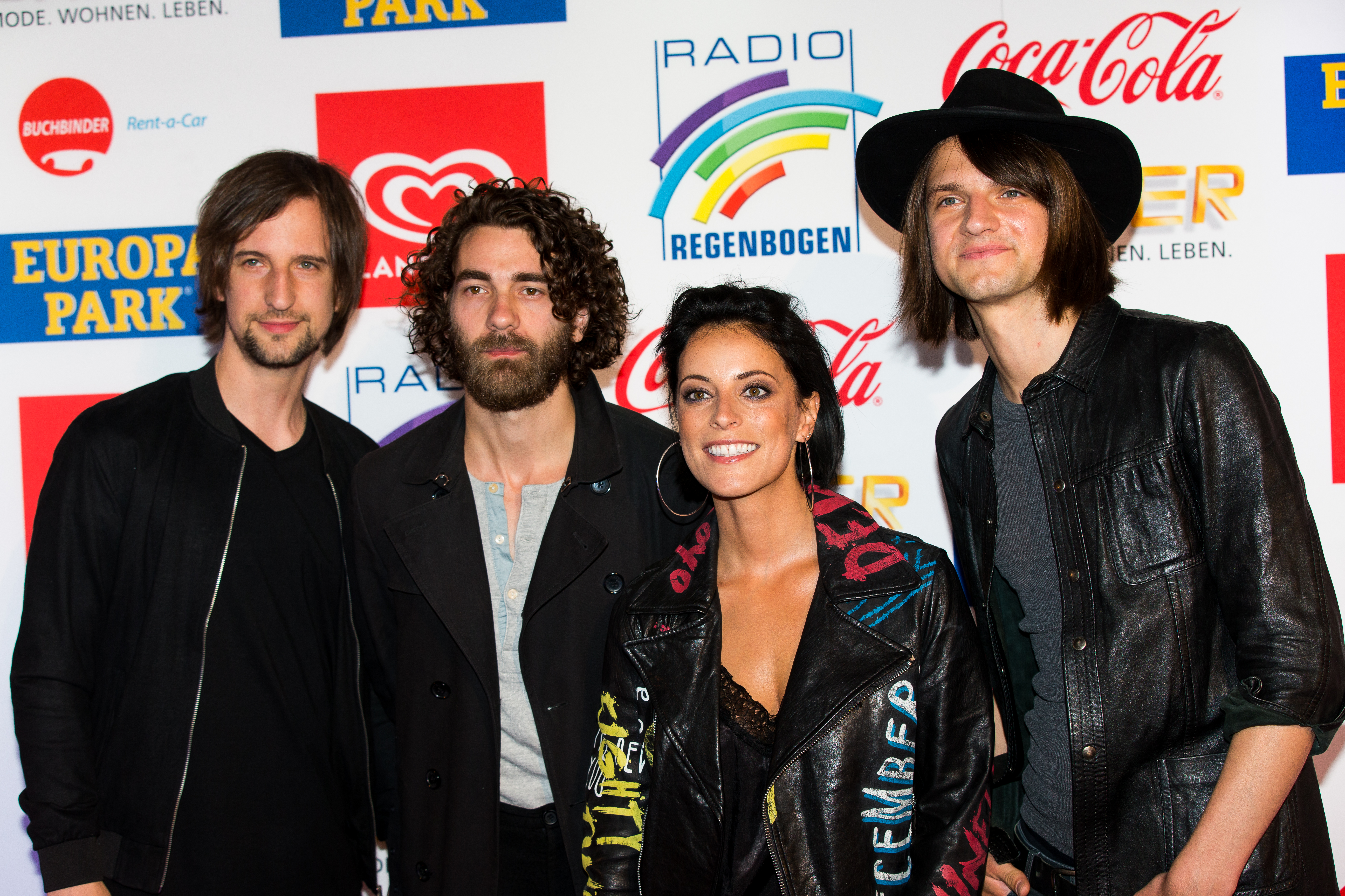 during Radio Regenbogen Award 2017 at Europapark, Rust, Baden-Württemberg, Germany on 2017-04-07, Photo: Sven Mandel